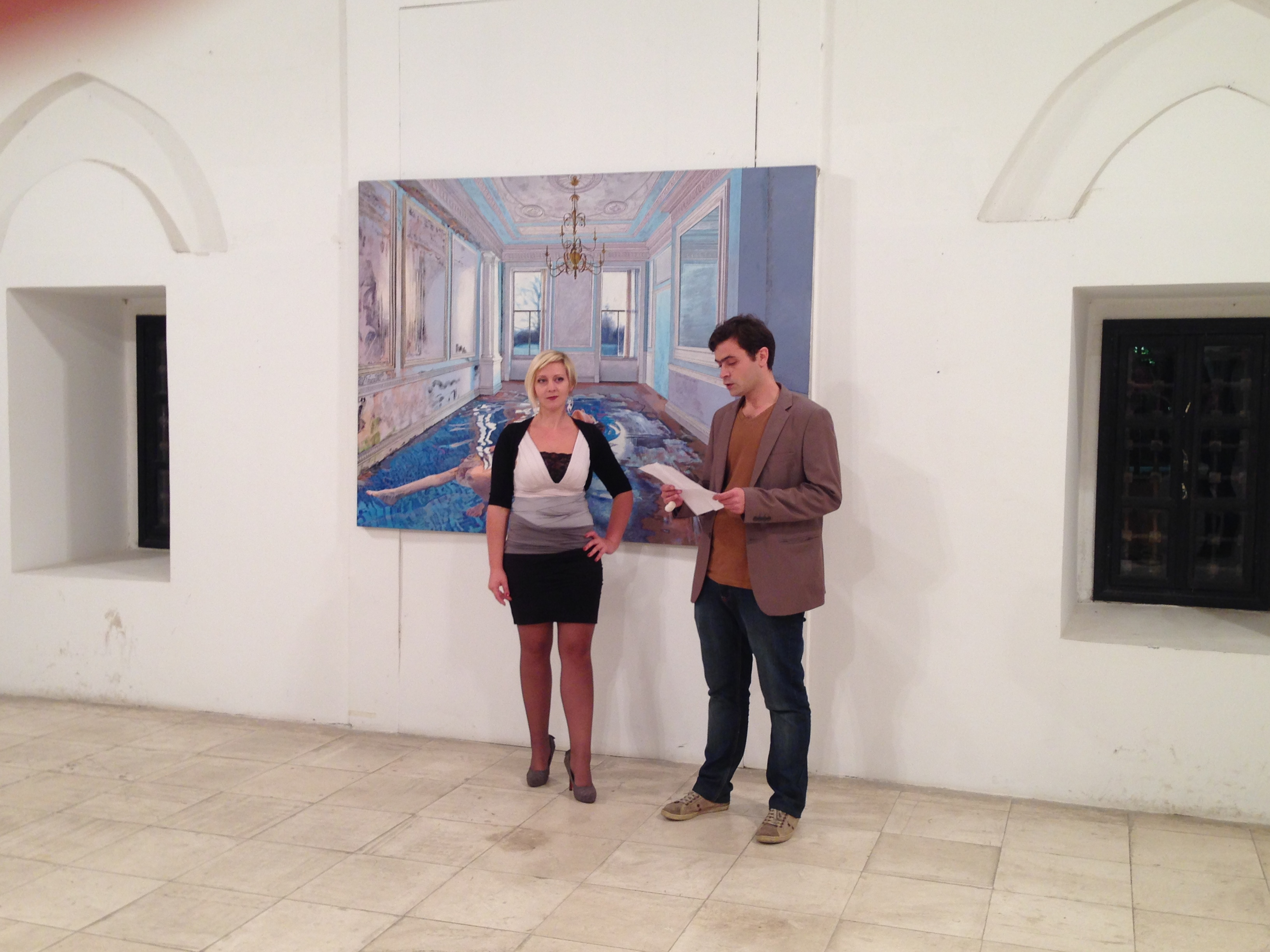 Srpski (latinica): Ivana Živić Jerković, na otvaranju samostalne izložbe "Sobe od vode" u GSL Niš, u Nišu, 6. oktobra 2015.